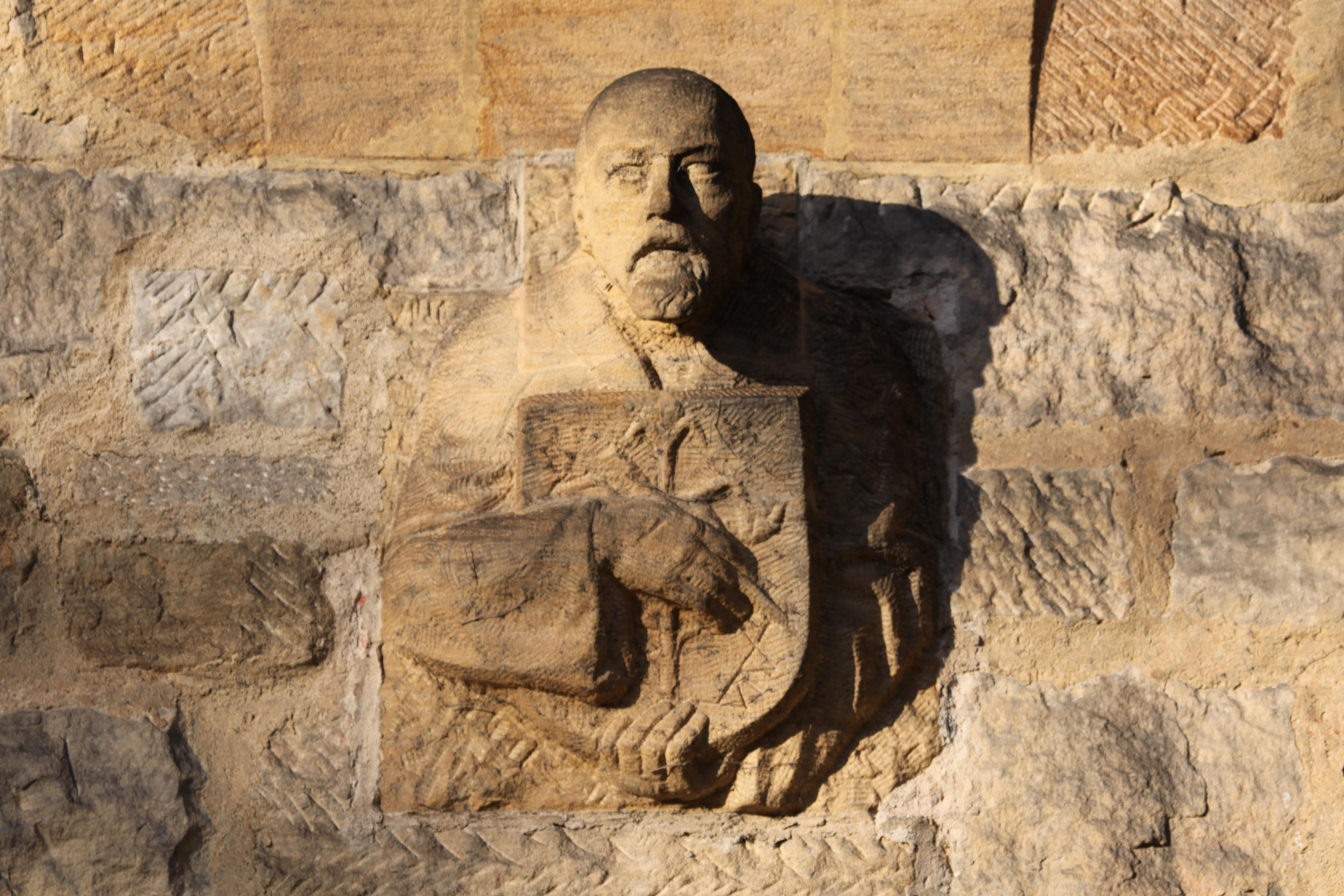 Veste Coburg, Bodo Ebhardt am Carl-Eduard-Bau